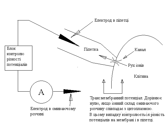 Схема patch-clamp в конфигурації Cell-attached